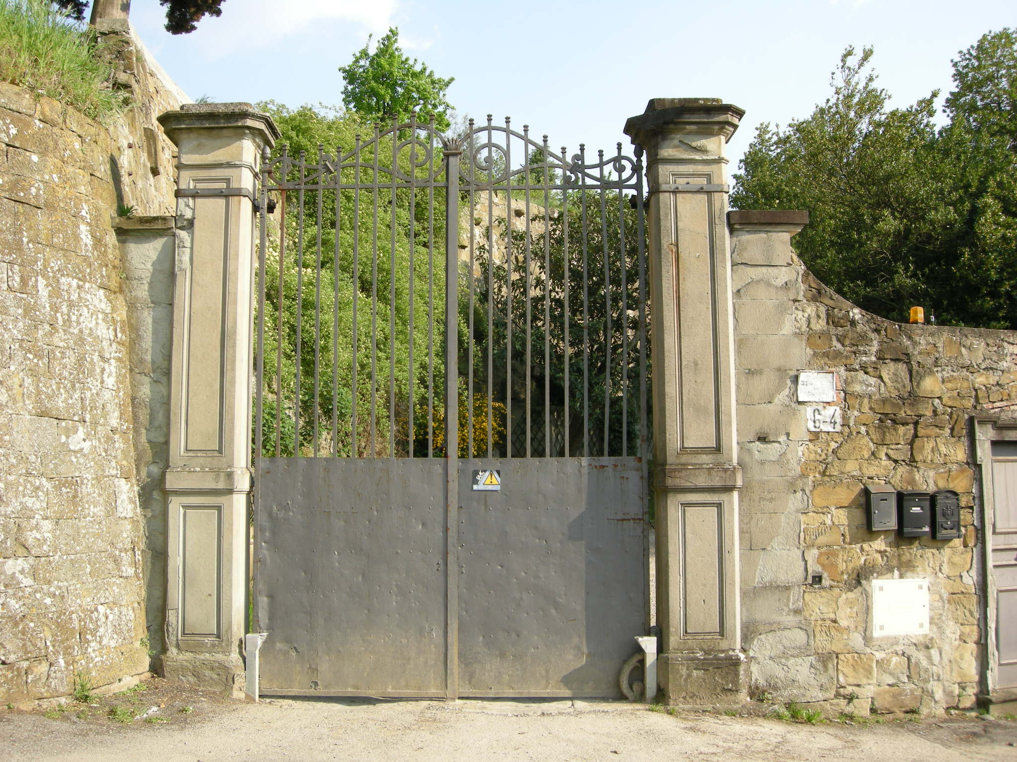 Villa martini bernardi firenze